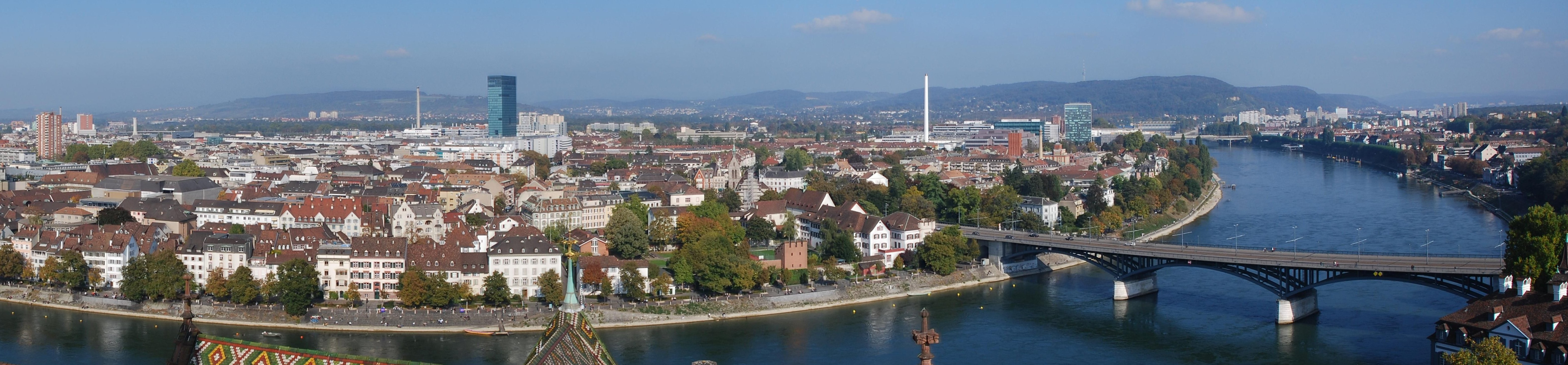 Panorama Basel vom Münster aus, 7.10.2007